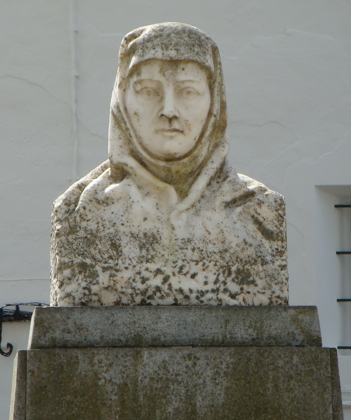 Busto de Públia Hortênsia de Castro (1548-1595) em Vila Viçosa (Portugal)